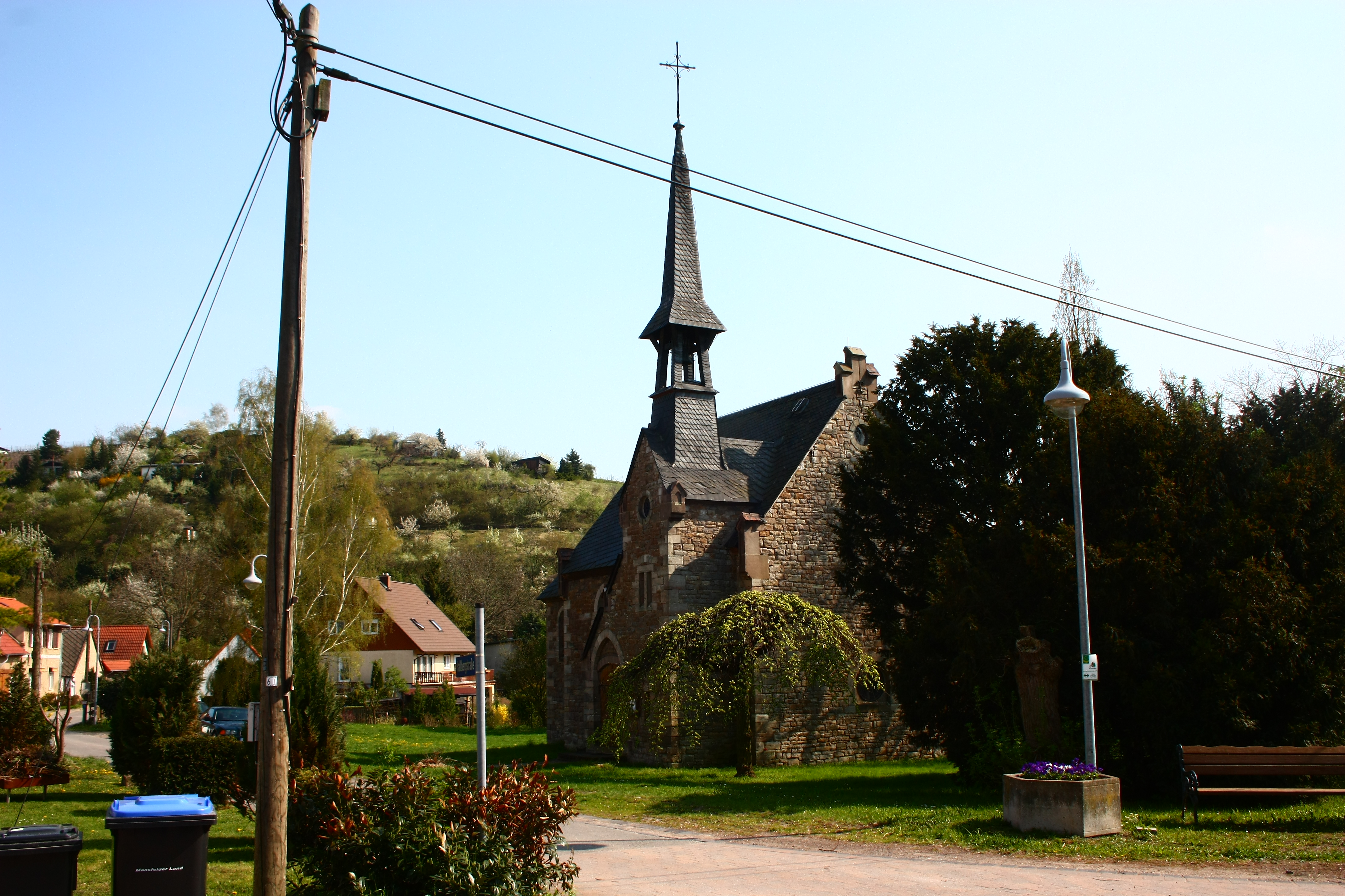 Dorfkirche von Rollsdorf